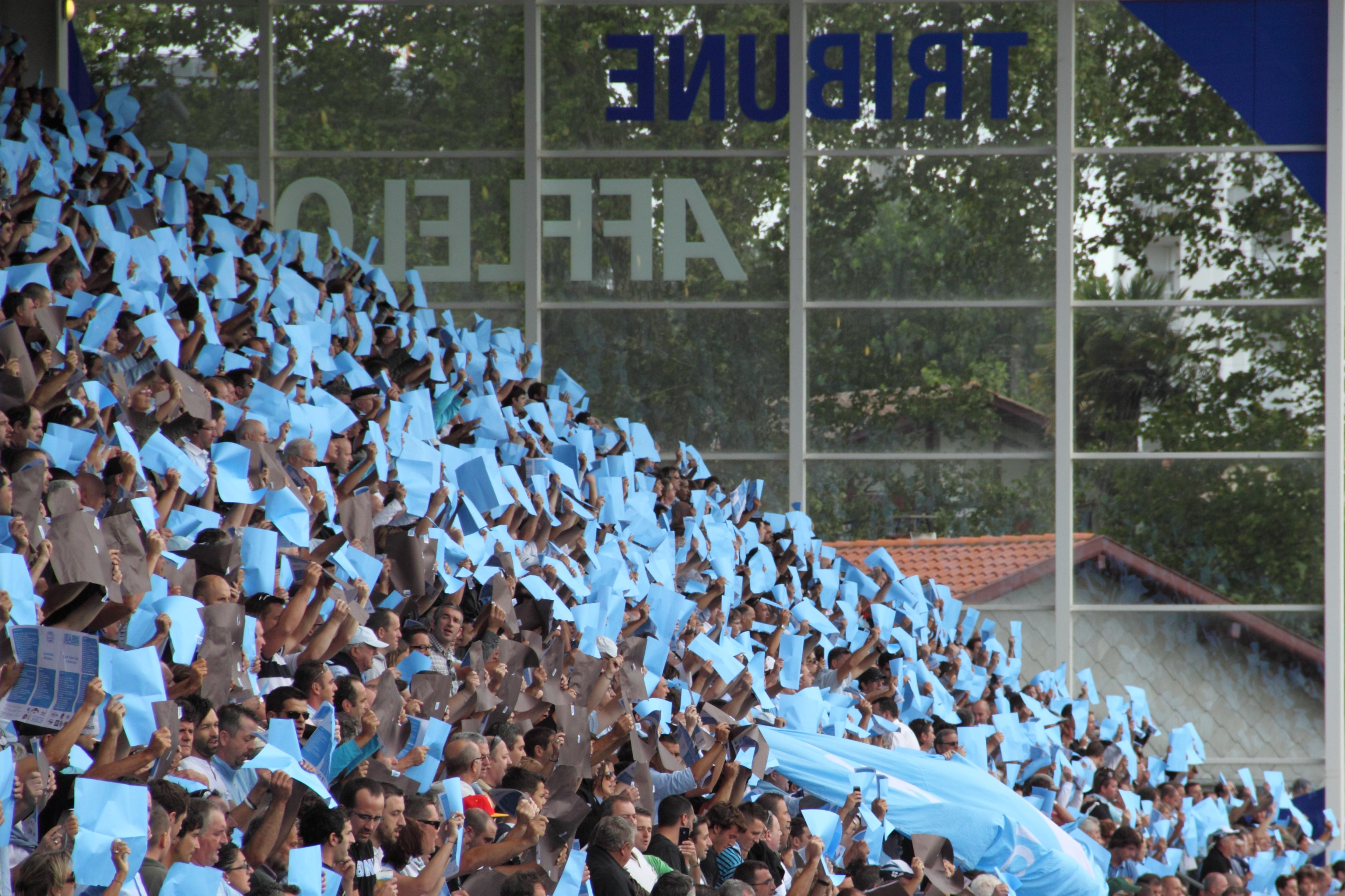 Supporters de l'Aviron Bayonnais lors du premier match de Top 14 2011-2012 contre le Stade toulousain